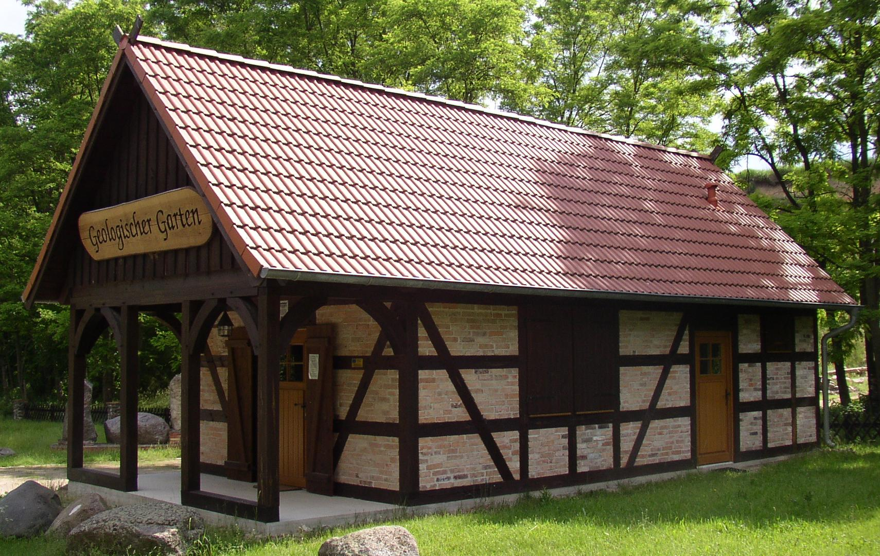 Vorlaubenhaus in Lunow-Stolzenhagen (2001 erbaut, Löwinghus = Laubenhaus, zum Geologischen Garten gehörend) in Brandenburg, Deutschland